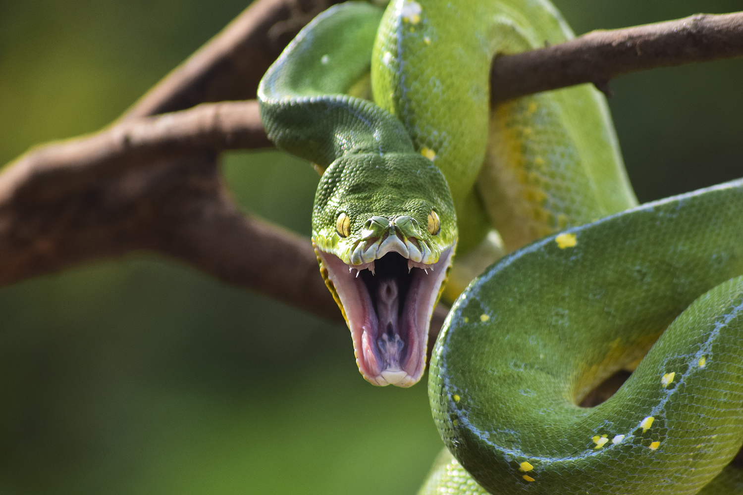 Green Tree Python (GTP), Morelia Viridis, Sanca hijau atau yang biasa dikenal dengan nama Chondro. Ular ini biasa hidup dibagian timur indonesia.